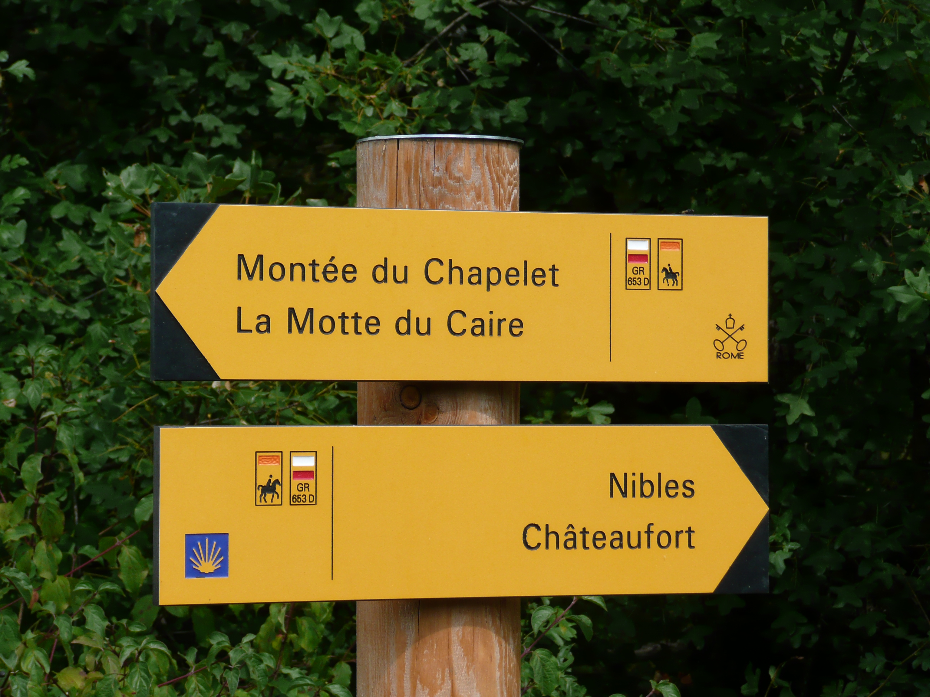 Nibles